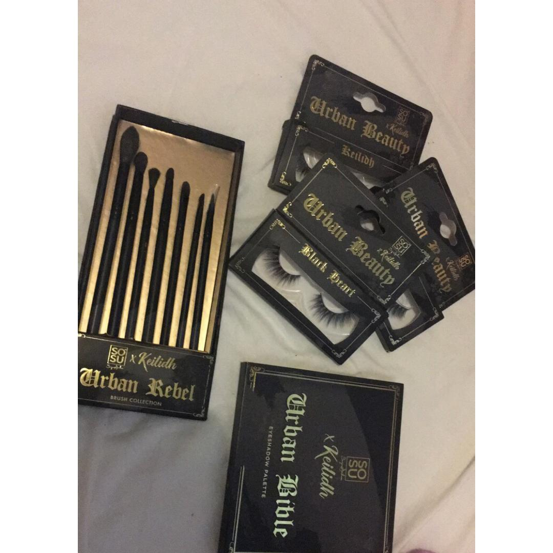 Keilidh Cashell's collectin with SoeSueMe